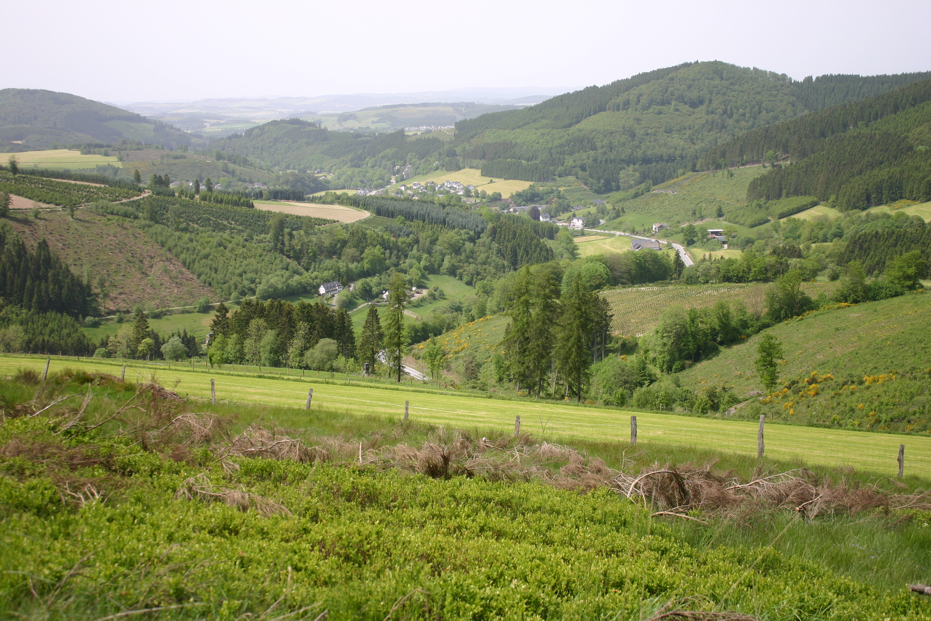 Blick vom Naturschutzgebiet Auf der Sommerseite (untere Bildbereich gehört zu NSG) auf Oberkirchen; Der Rest der freien Landschaft gehört meist zum "Landschaftsschutzgebiet Schmallenberg Südost"; Kleinere Bereiche gehören zum "Landschaftsschutzgebiet Grünlandinseln im Rothaargebirge zwischen Wohnplatz Esmecke und Vorwald".